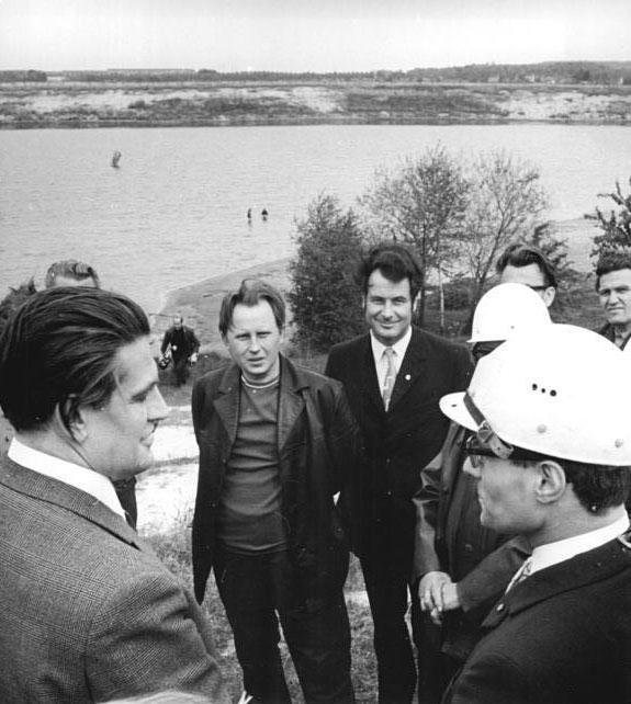 Regis, BKK, Besuch von Hans Reichelt ADN-ZB Gahlbeck 19.5.73-st-Bez.Leipzig:Zur Woche der sozialistischen Landeskultur-Unmittelbar vor Eröffnung der Woche der sozialistischen Landeskultur 1973 informierte sich am 18.5.73 der Stellvertreter des Vorsitzenden des Ministerrates und Minister für Umweltschutz und Wasserwirtschaft, Dr.Hans Reichelt(l.) im Braunkohlenkombinat Regis (Kr.Borna) über die Verwirkllichung von Umweltschutzmaßnahmen.Technologe Dieter Lange(r.) berichtete, daß im vergangenen Jahrfünft der Forstwirtschaft 813 Hektar Fläche mehr zuückgegeen wurde, als der Betrieb in gleichen Zeitraum für seine Zwecke nutzte.Hier an einem Badesee in der Nähe von Luppa, der mit Hilfe des Kombinats und dem Meisterbereich "Urbarmachung" aus einem Tagebaurestloch entstanden ist.